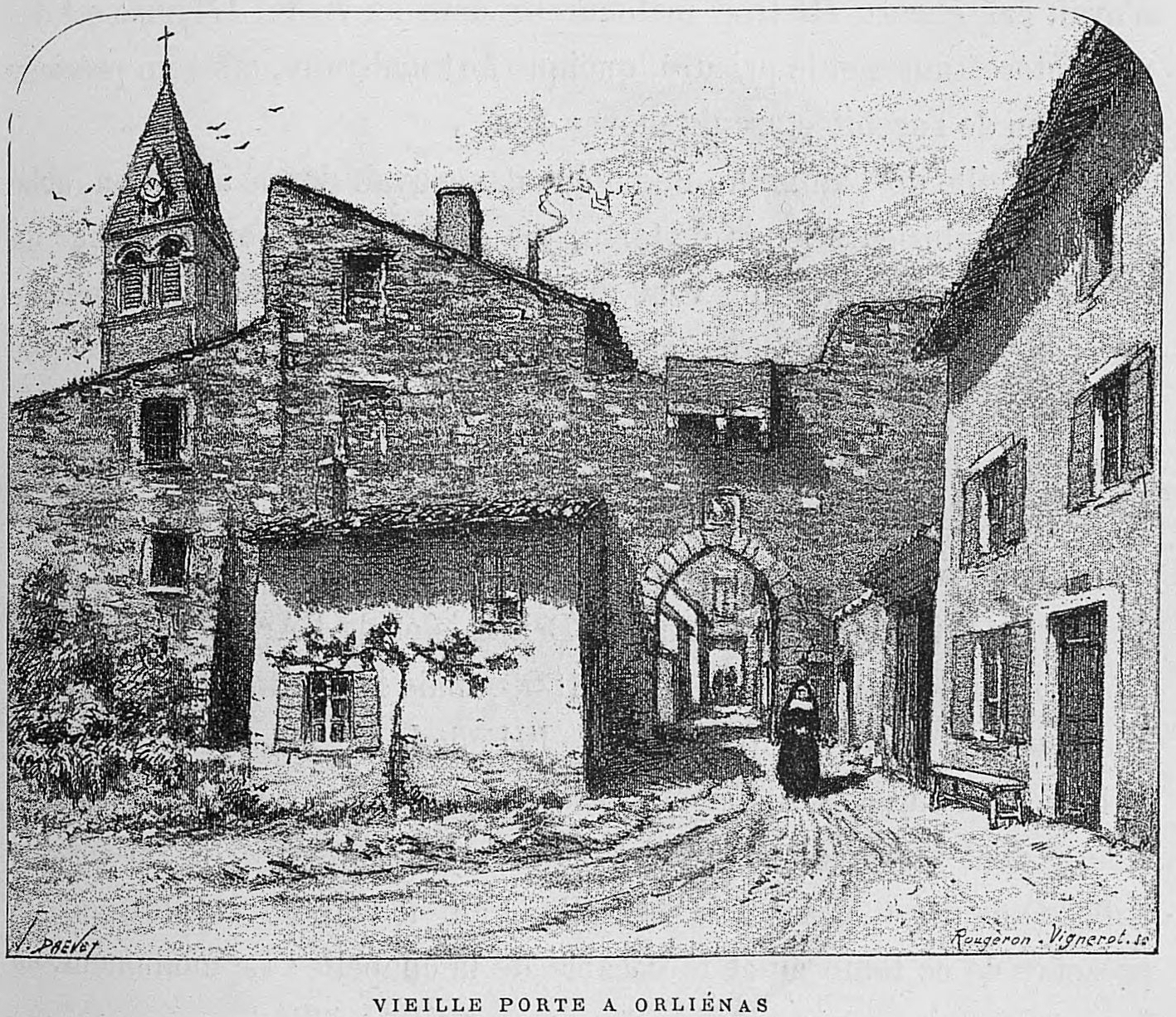 Aux environs de Lyon / Monsieur Josse ; préface de M. Coste-Labaume ; édition illustrée de 250 dessins de J. Drevet.